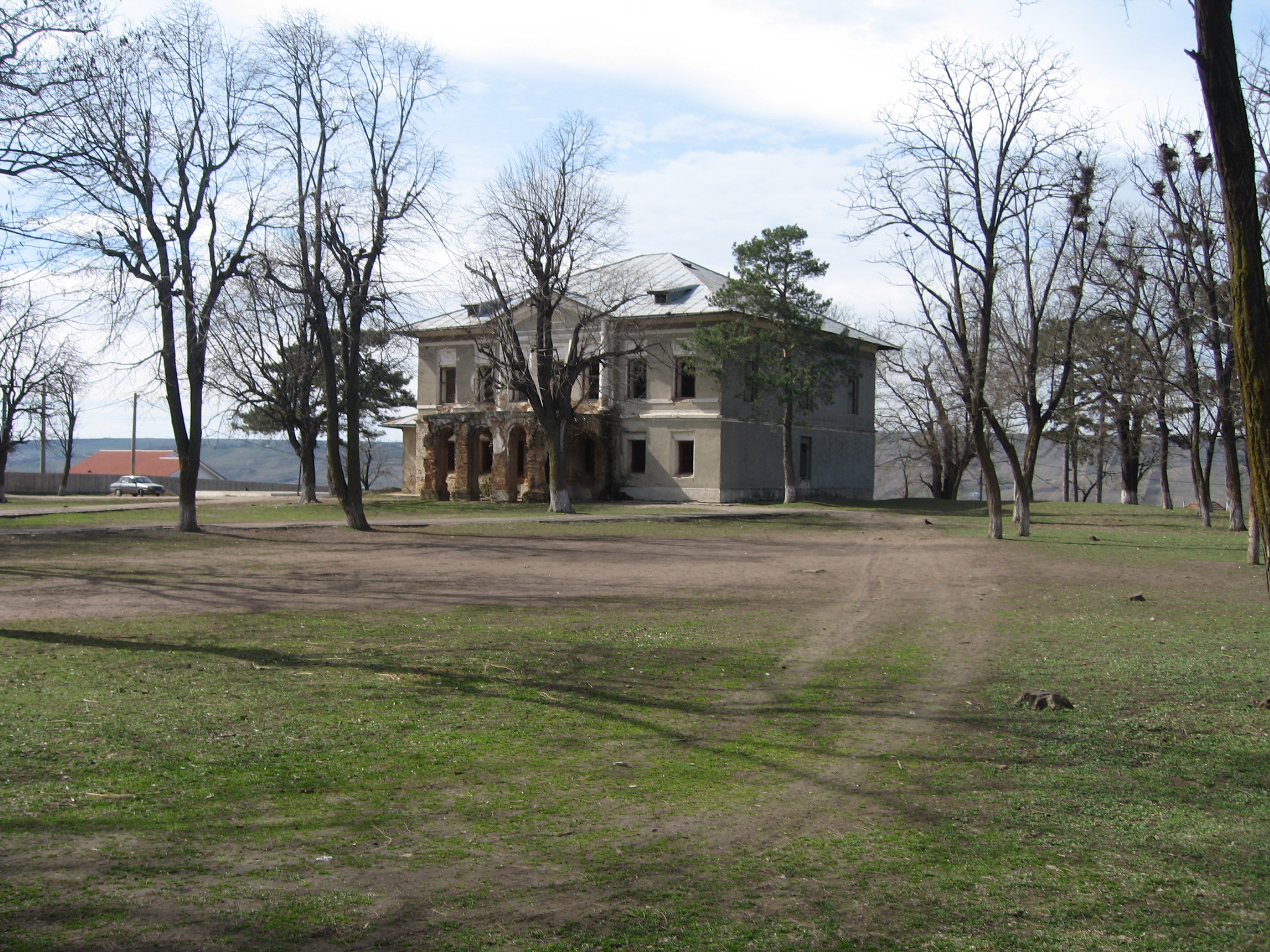 Conacul din Soleşti 02